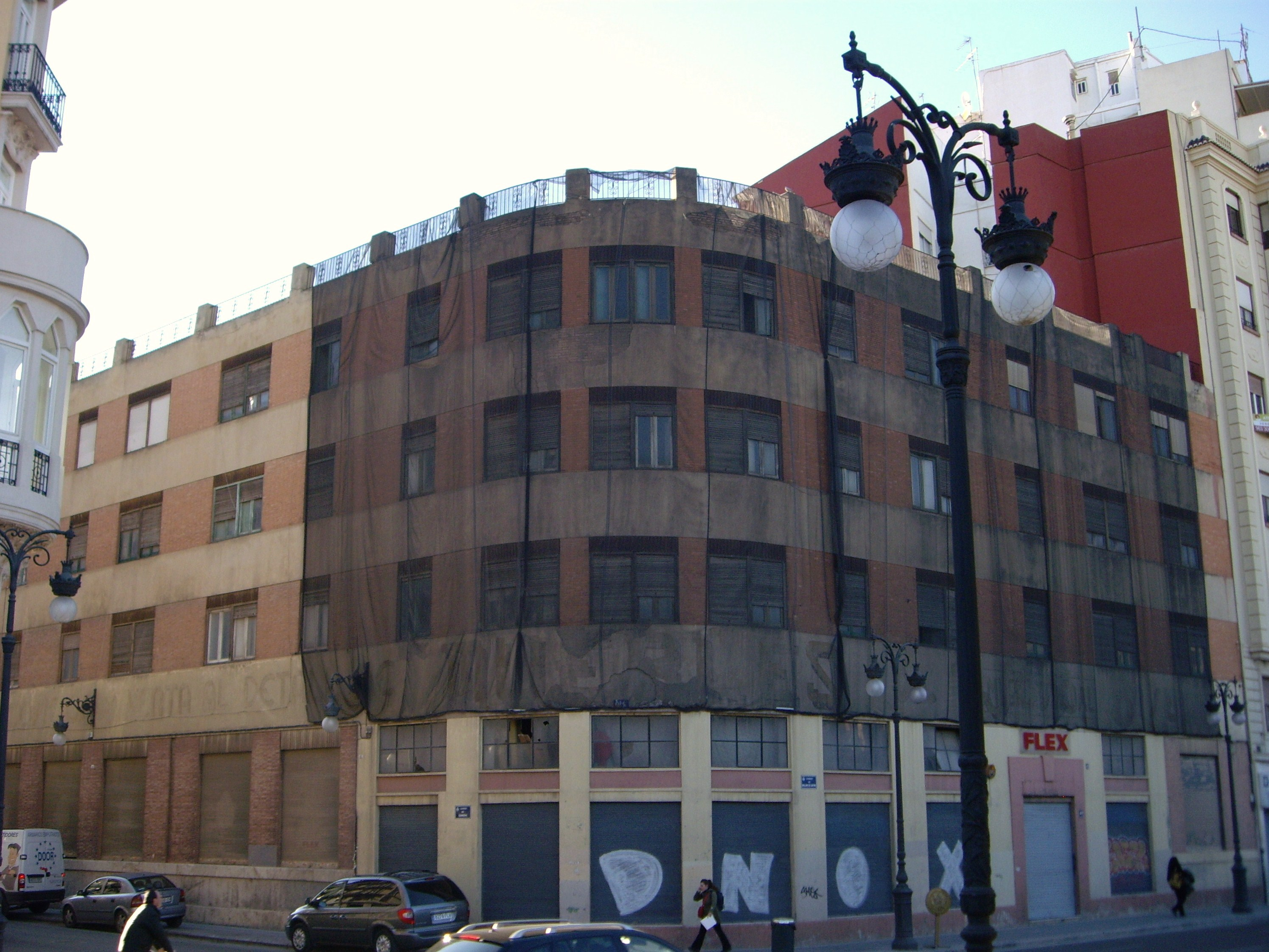 Edifici "Cuadrado" de la ciutat de València. Arquitecte Joaquín Rieta Síster, 1935. Carrer Guillem de Castro amb carrer Gandia.